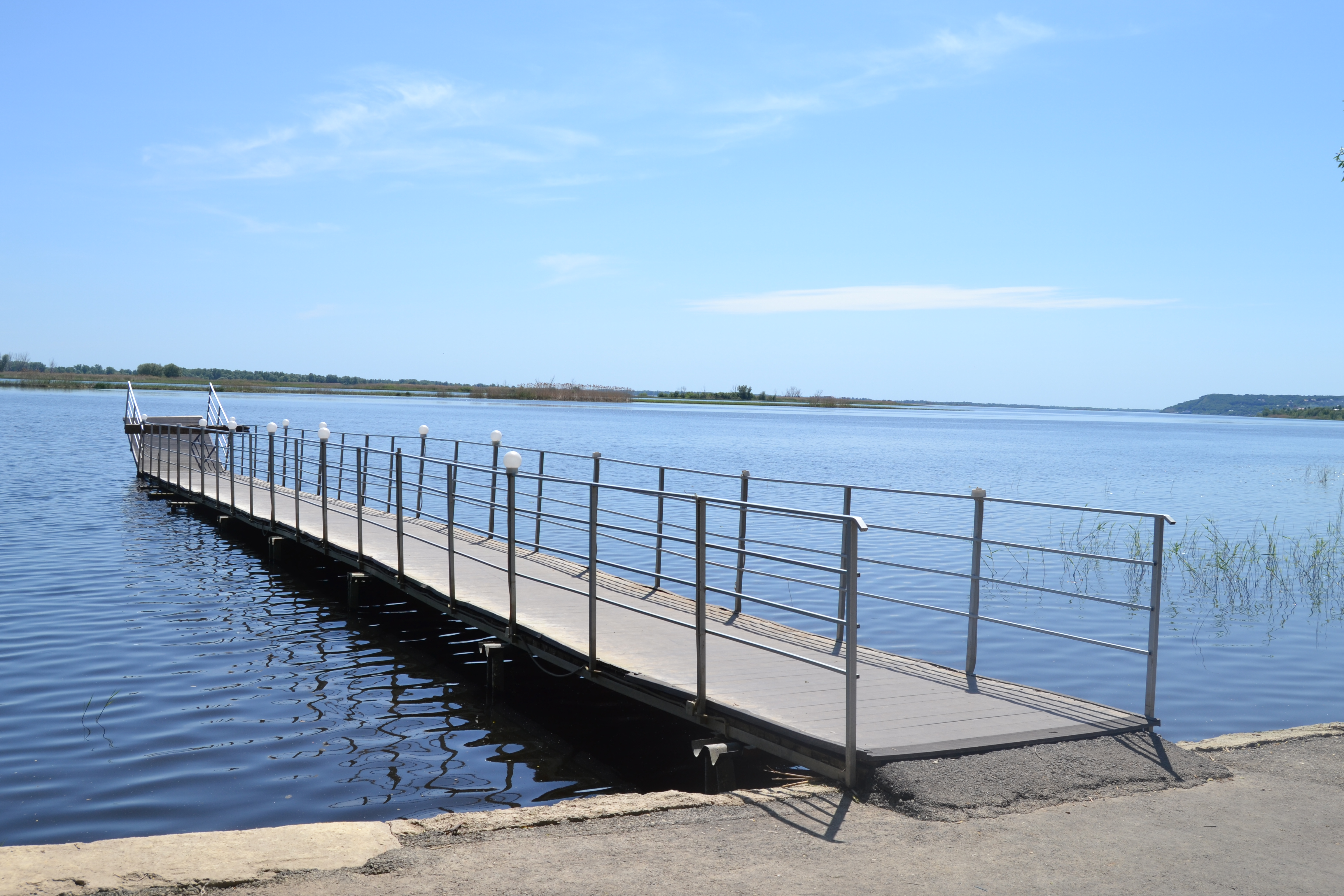 Изображение села. Пристань (Сабуровка, Саратовский район)